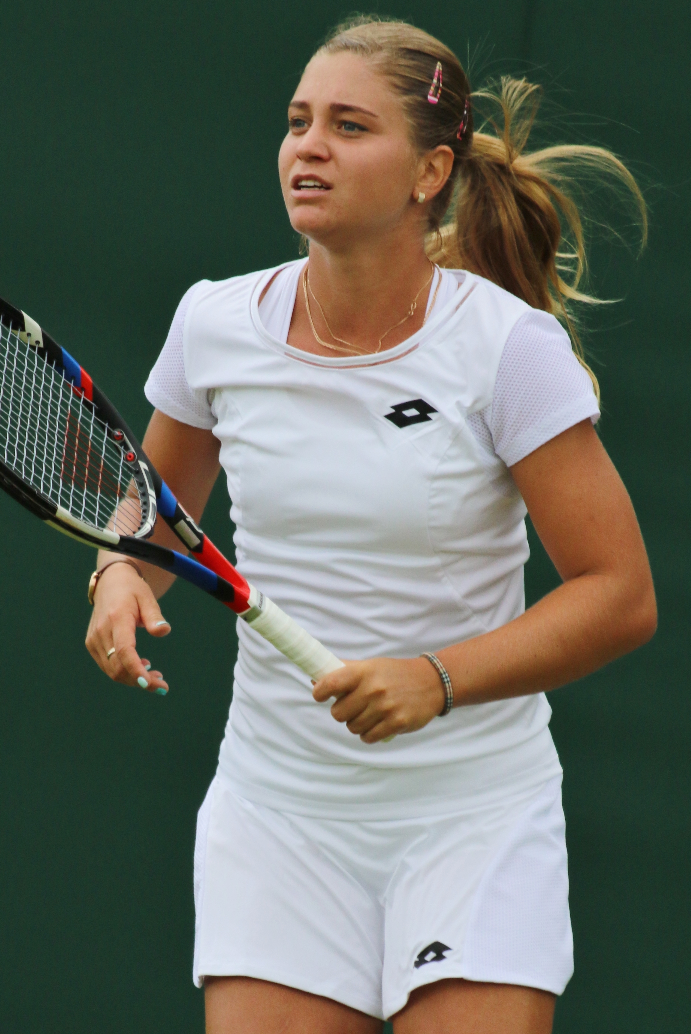 Khromacheva WM17 (12)